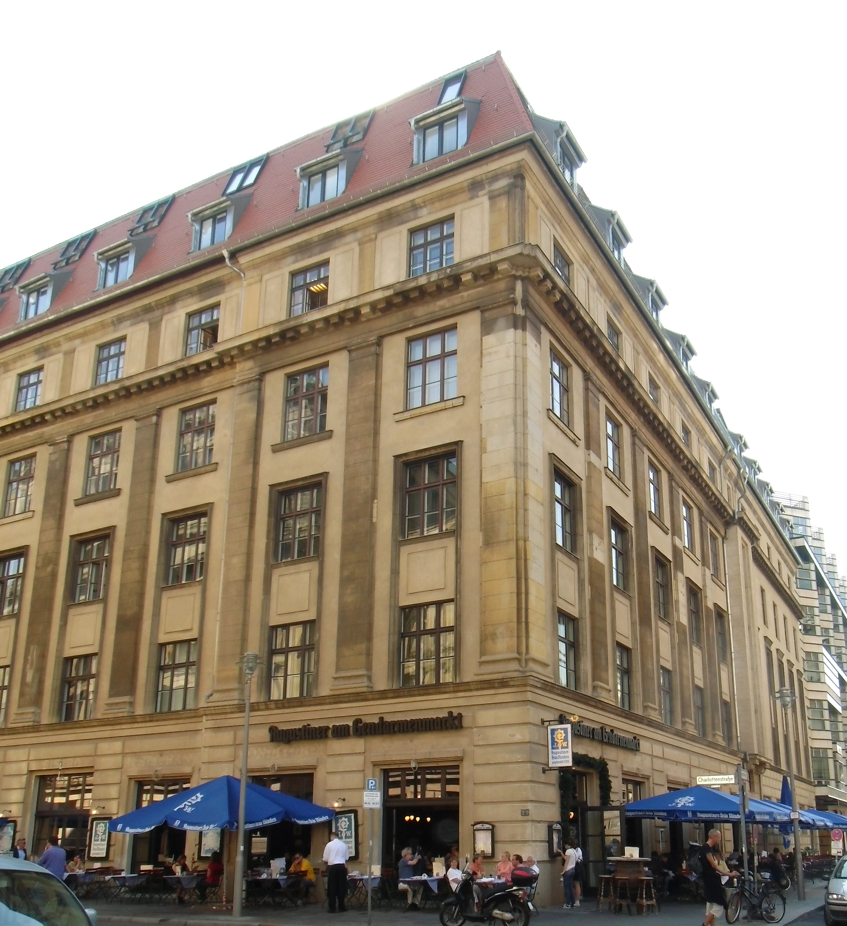 Geschäftshaus im denkmalgeschützten Ensemble Gendarmenmarkt, erbaut 1907-1908 von Otto March